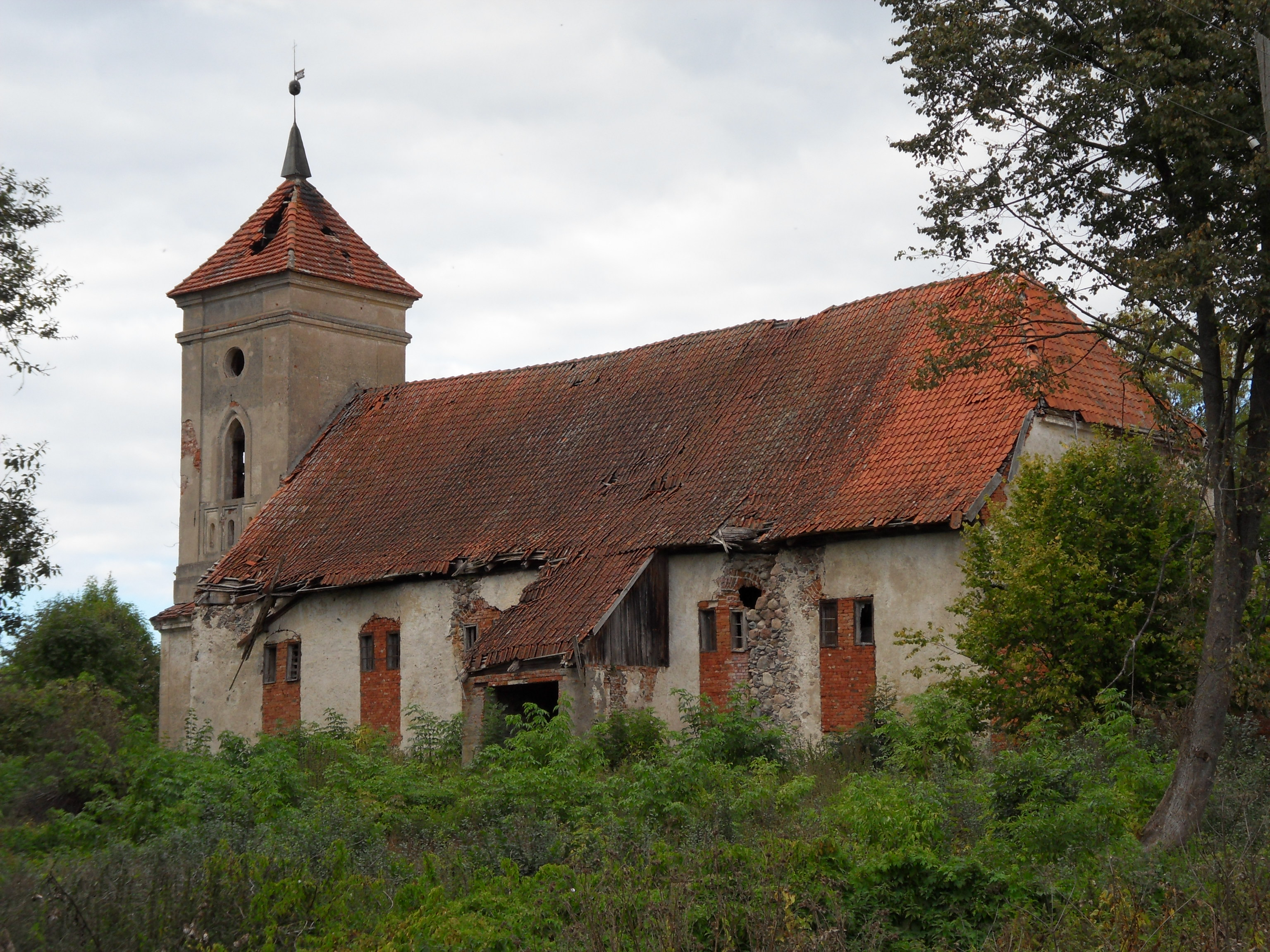 Kirche Mulden Südseite